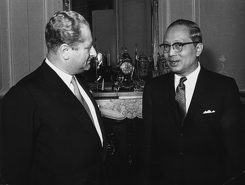 Bruno Kreisky mit UN-Generalsekretär Uthant, 3.9.1962